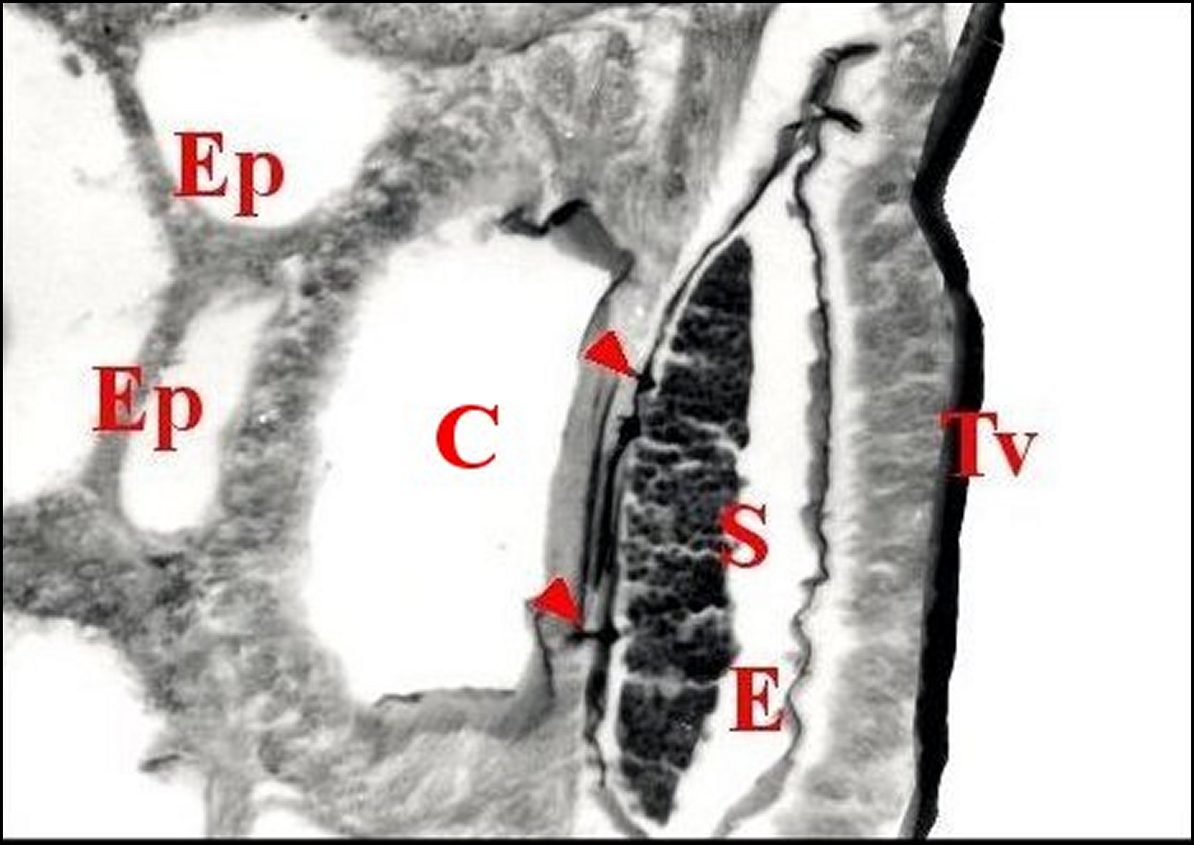 Appareil épigastrique de Pholcus phalangioides avec ses glandes acinoïdes prégonoporales et ses organes sensoriels gonoporaux en coupe histologique horizontale.